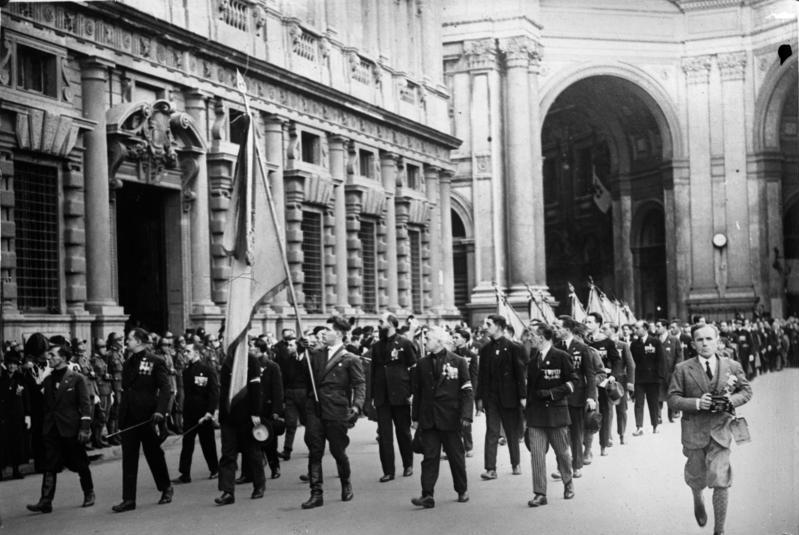 Der italienische Herzog d' Aosta nimmt als Beauftragter des Königs eine faschistische Parade in Mailand ab! Vorbeimarsch italienischer Frontkämpfer vor dem Herzog d' Aosta in Mailand. Information added by Wikimedia users.*